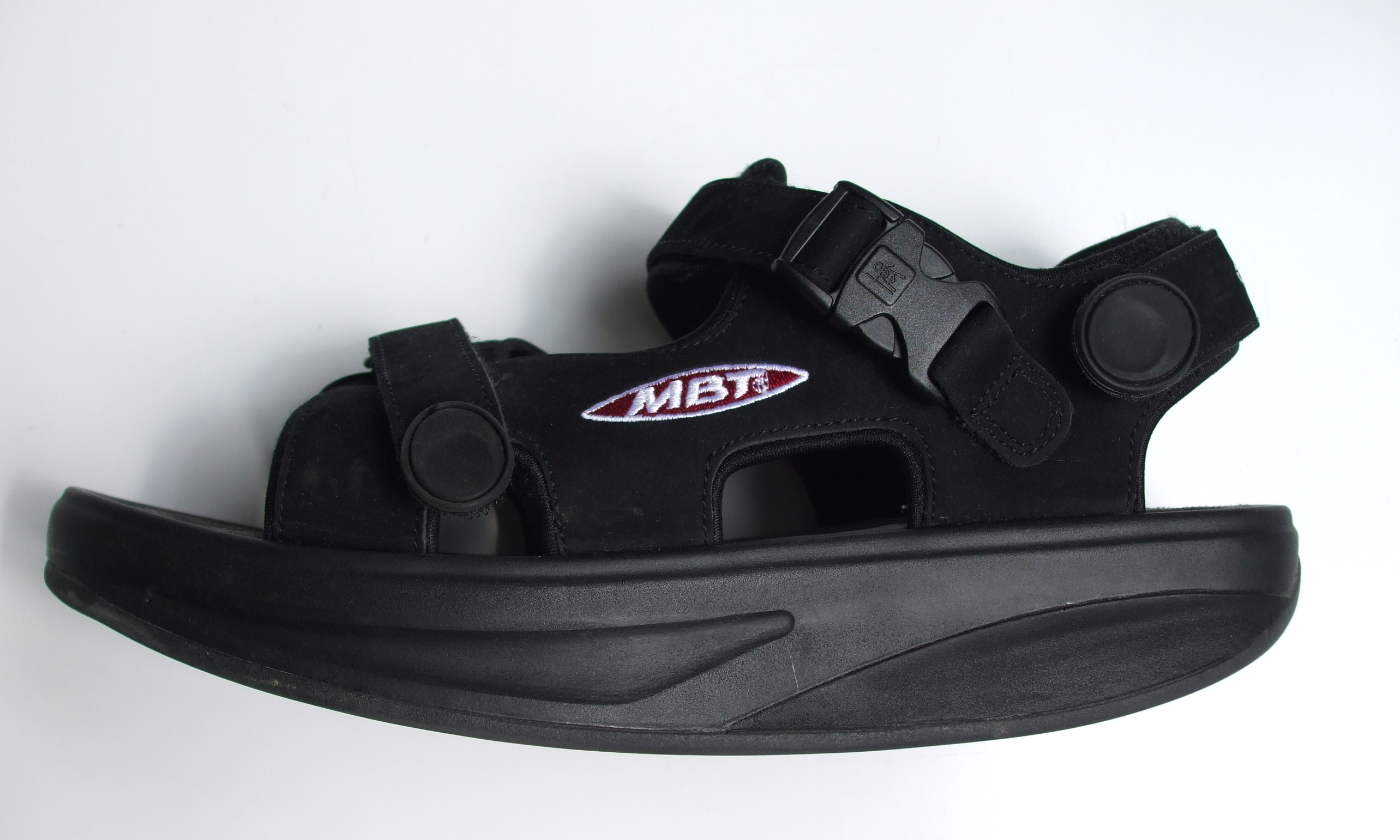 MBT- (Masai Barefoot Technology)- Sandale Jahr 2008 (-Label) Seitliche Aufnahme zeigt die gebogene Sohle.